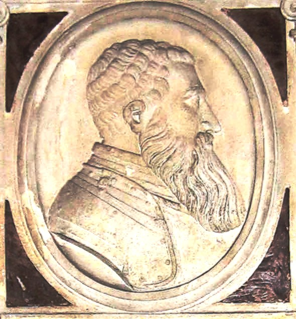 nagrobek Stanisława Bojanowskiego w klasztorze dominikanów w Krakowie author-Maciej Szczepańzcyk user-Mathiasrex